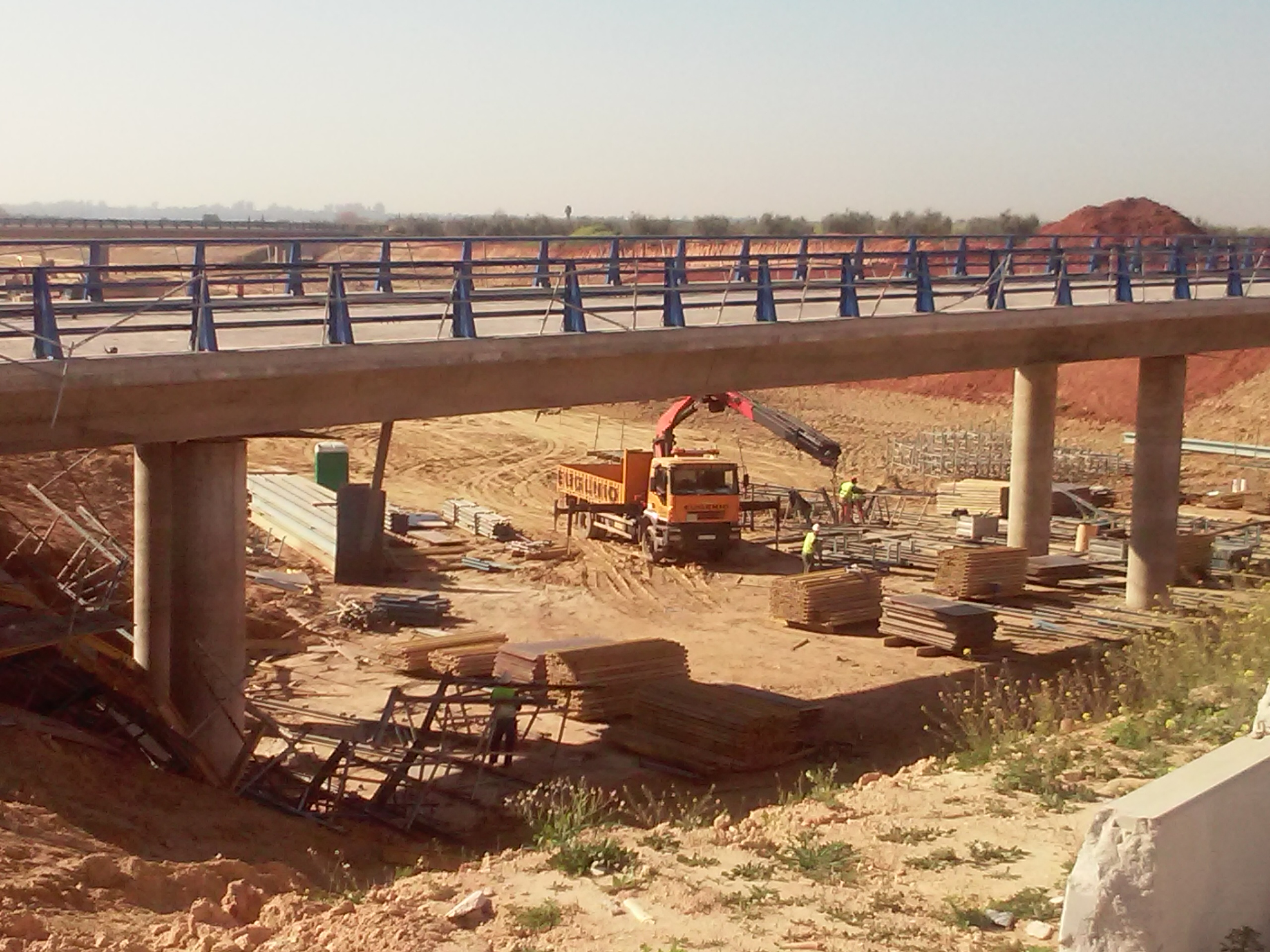 Estado de las obras de construcción de la SE-40 cerca de Almensilla, Sevilla